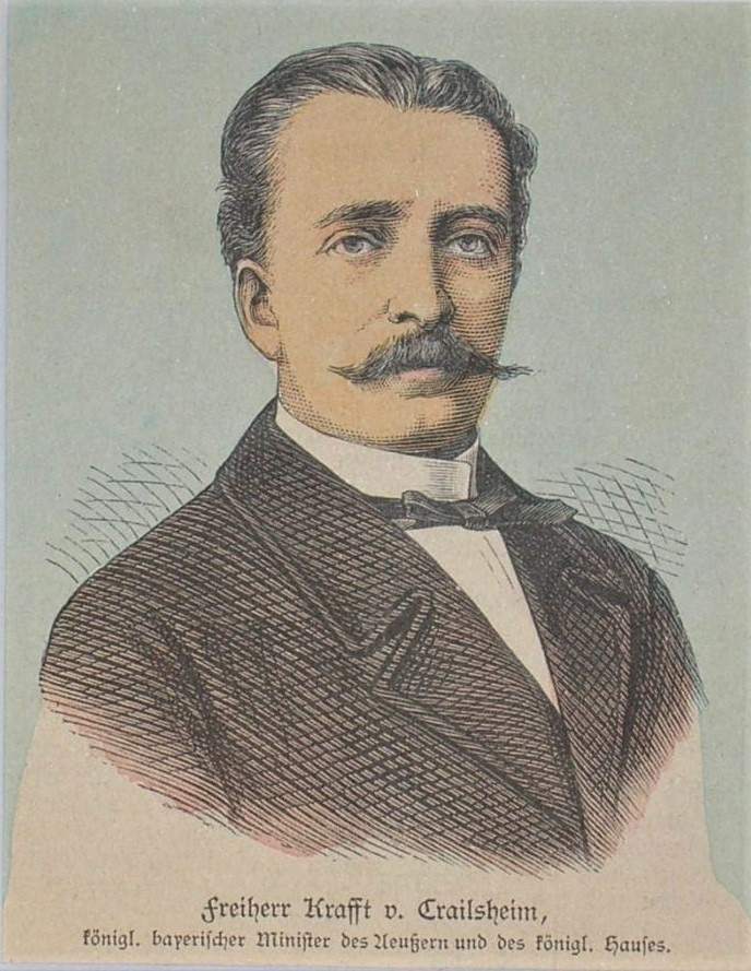 Freiherr Friedrich Krafft von Crailsheim (kgl. Bayerischer Minister des Äußeren und des kgl. Hauses) 1880, teilkolorierter Holzstich, ca. 11 x 7,5 cm